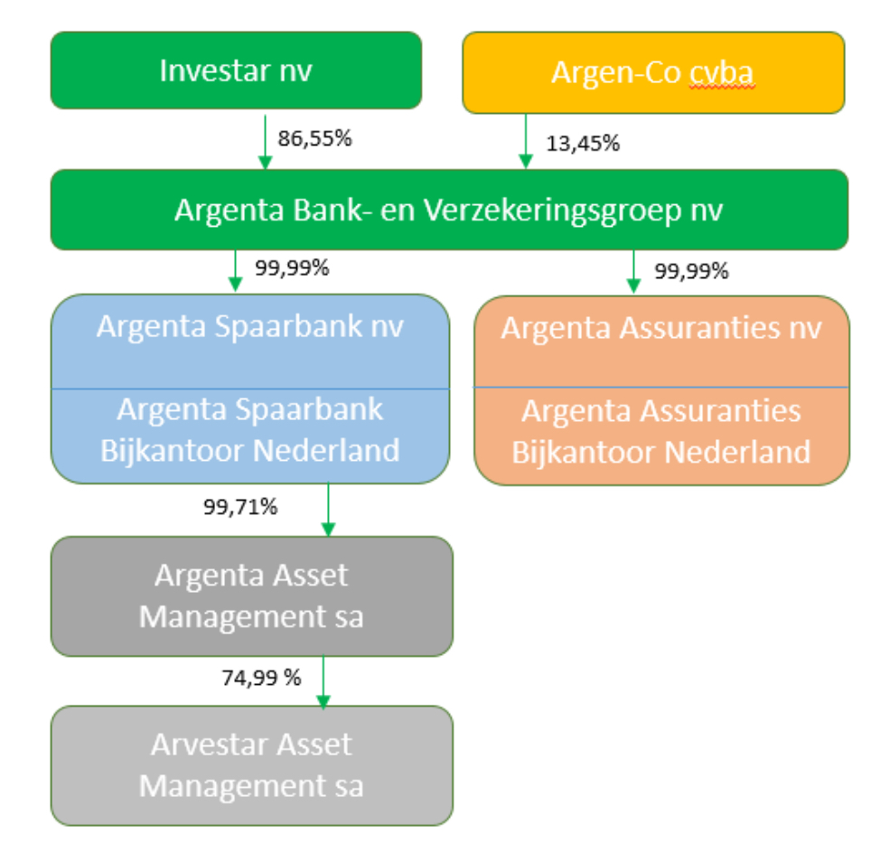 Visuele beschrijving structuur Argenta eind 2018